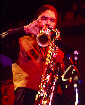 Art Porter, Jr.